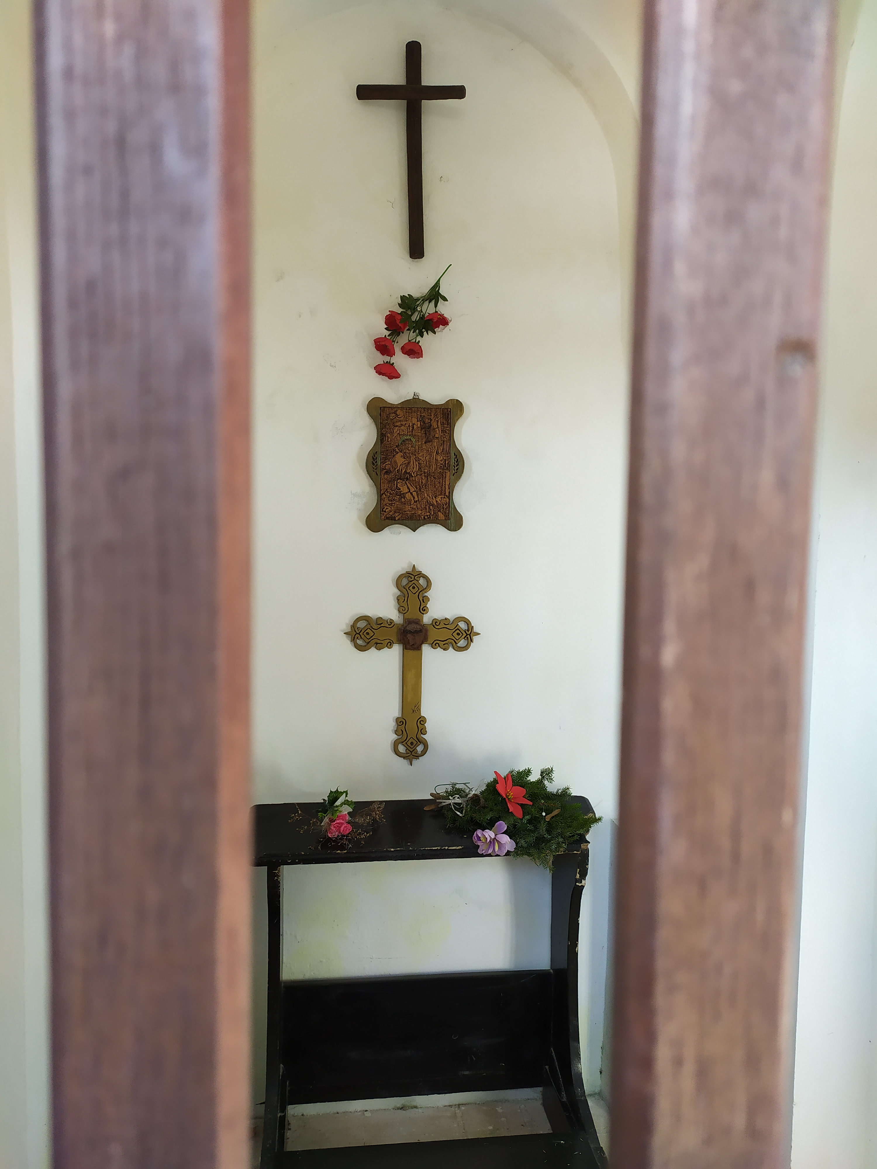 Interiér Kaple svatého Isidora